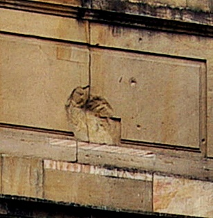 Frankenthal Speyerer Tor, Einschüsse von 1794